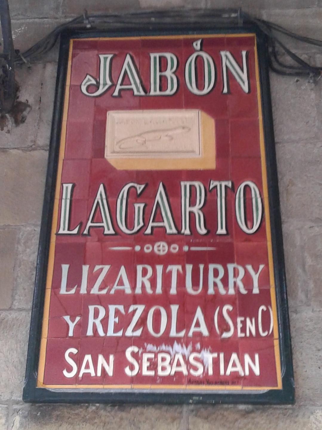 Hernaniko iragarki zaharra.